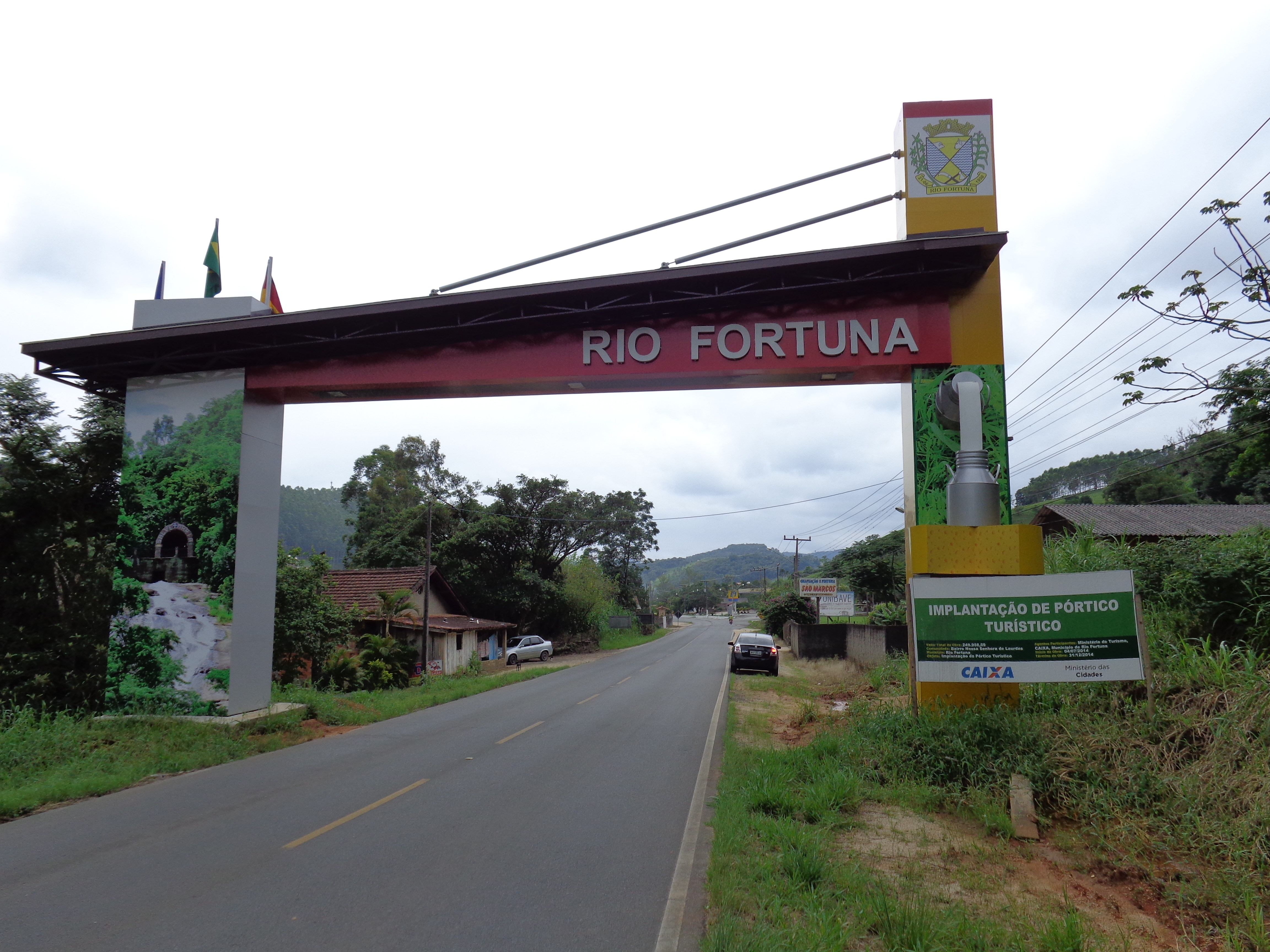 Pórtico de acesso a Rio Fortuna a partir de Braço do Norte